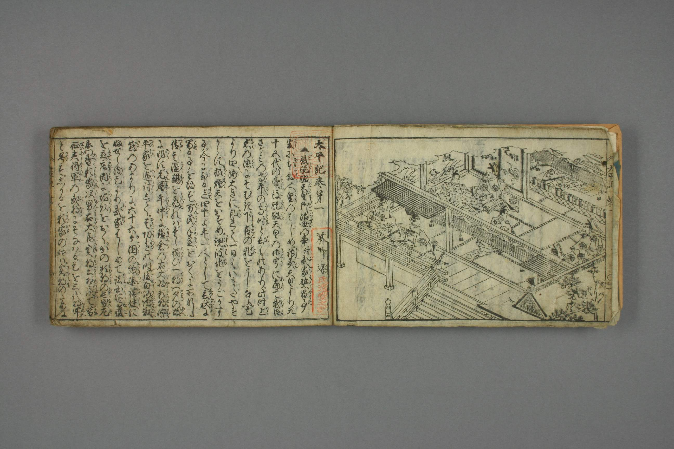 page du Teiheiki, page 5 du premier volume provenant d'une édition de 1698